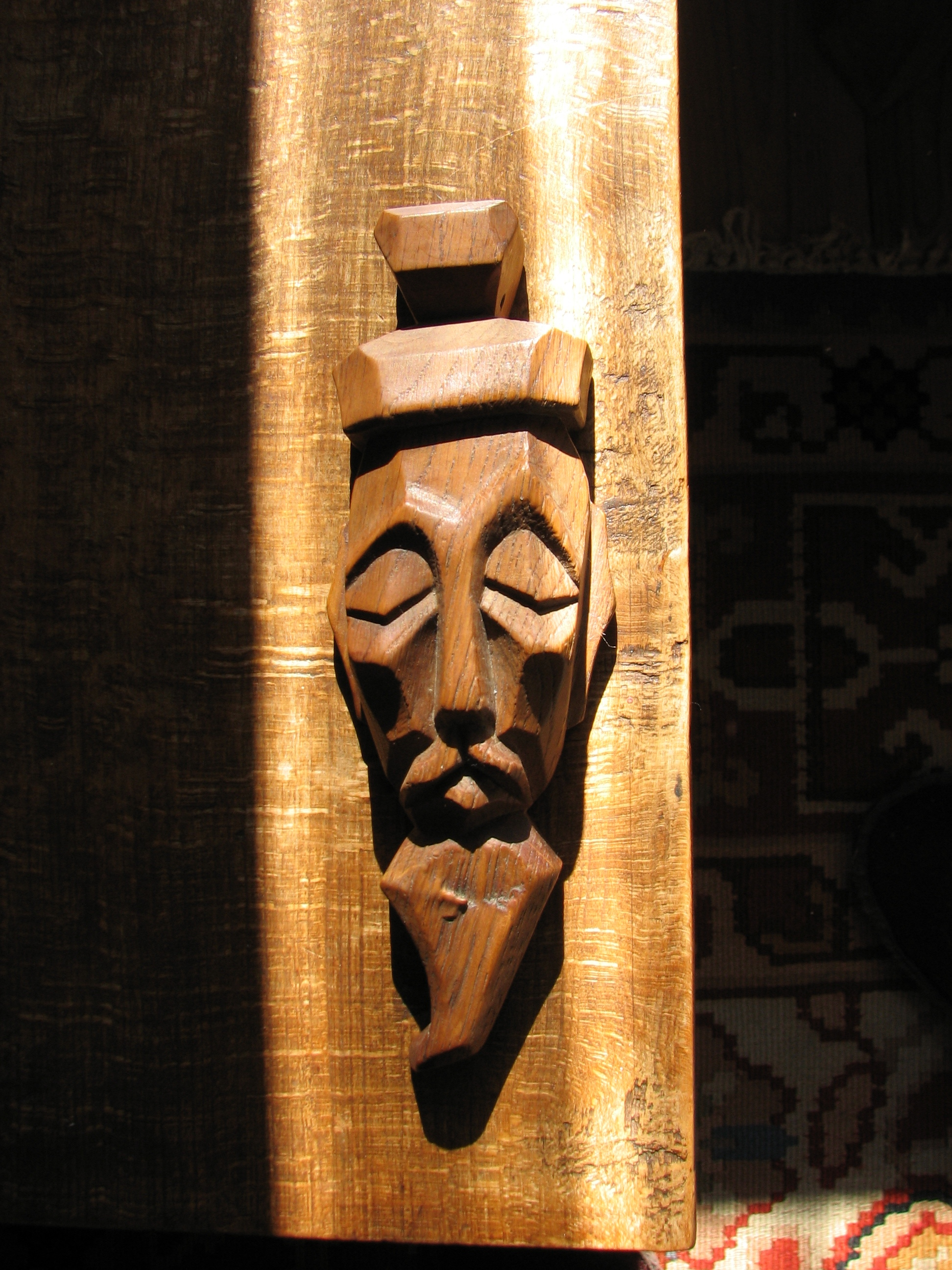 Тотем "Човекът от Тибет".Дърво,Дъб.